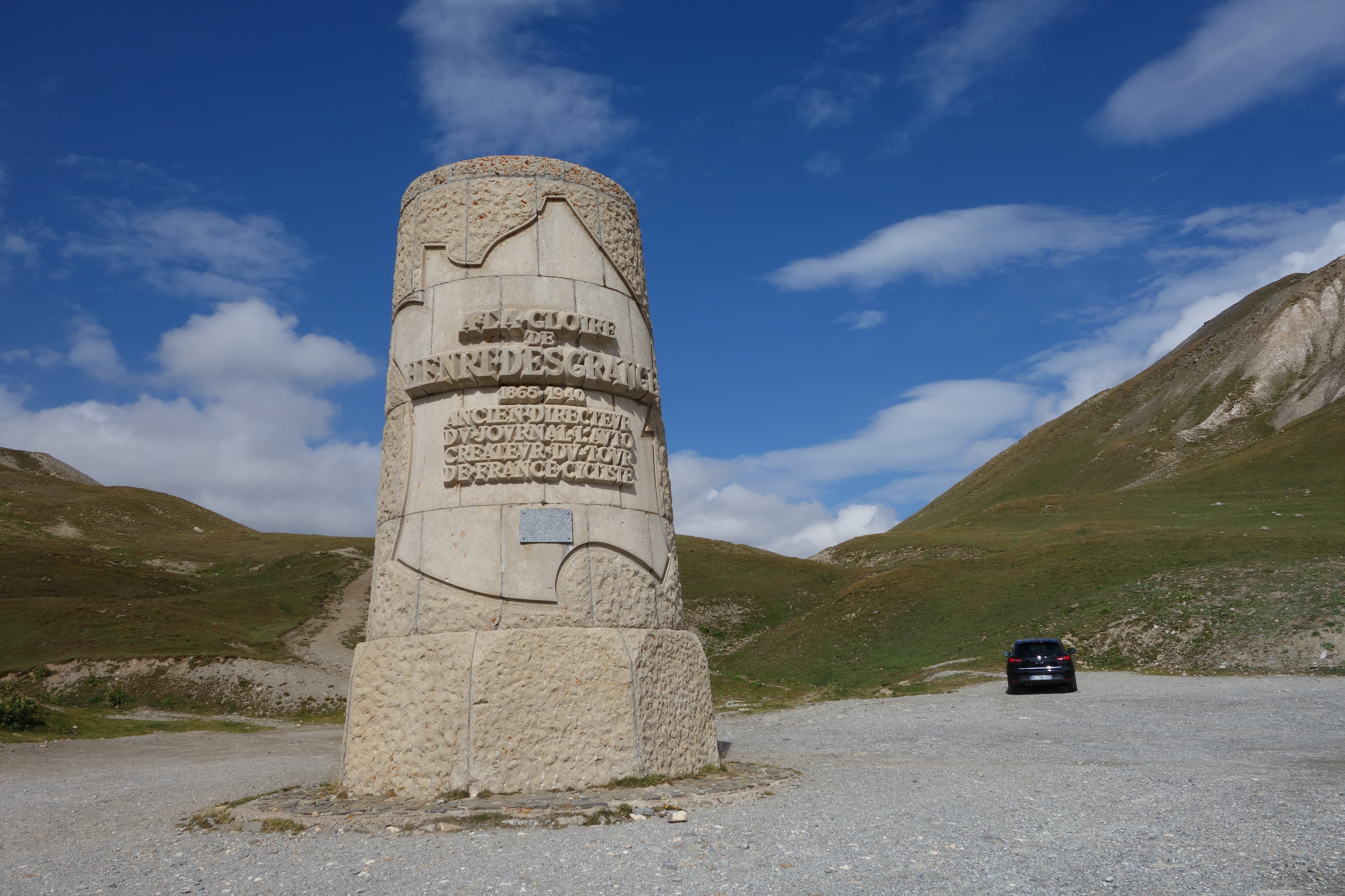 Памятник Анри Денгарнжу рядом с Col du Galibier